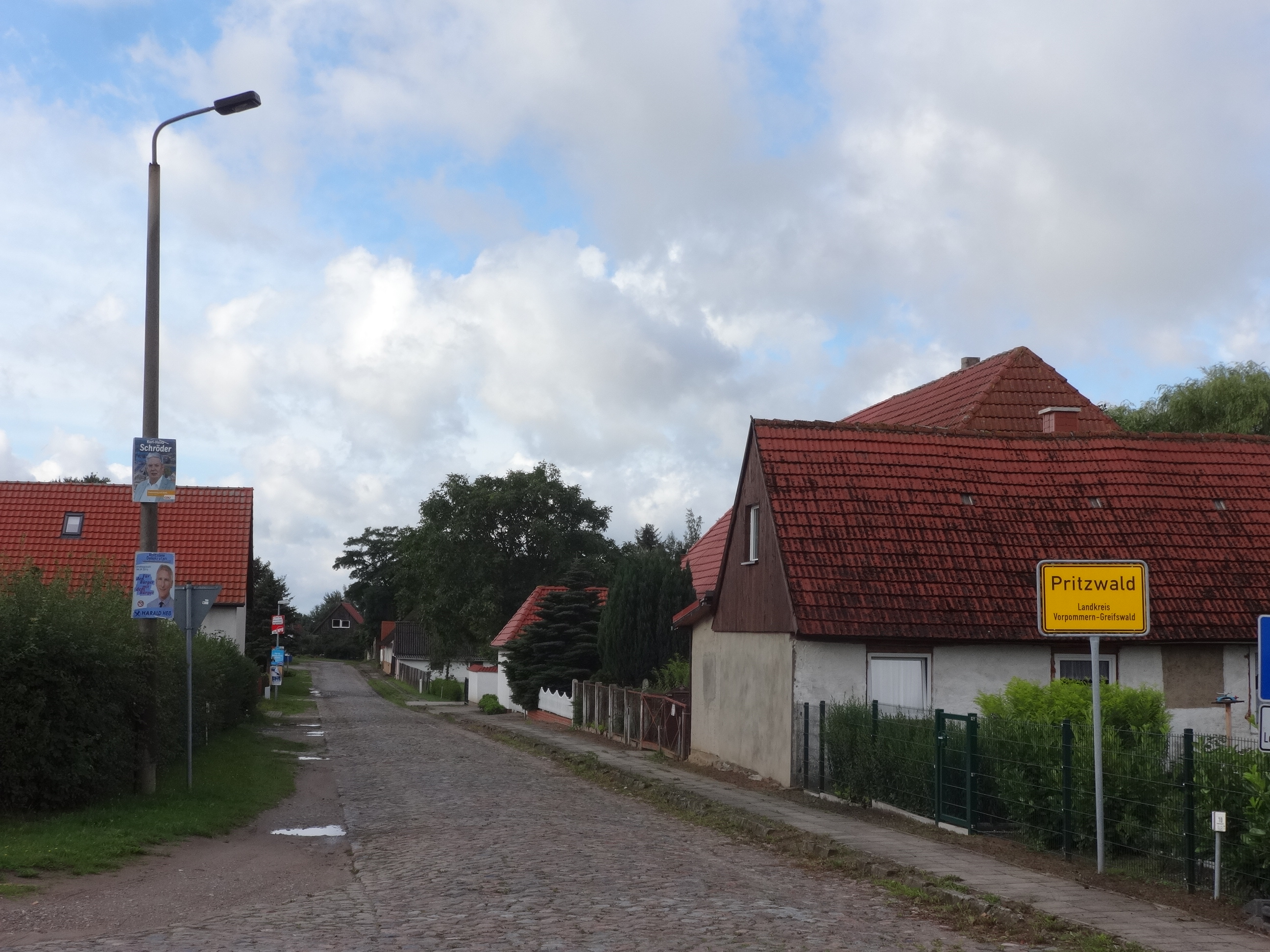 Pritzwald, ein Ortsteil der Gemeinde Wusterhusen in Mecklenburg-Vorpommern